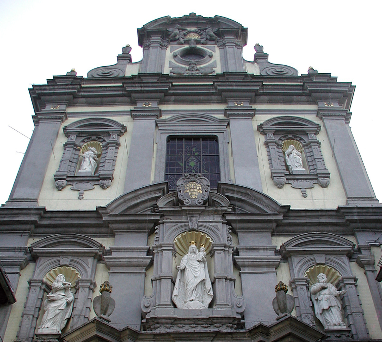 St. Maria vom Frieden, Köln